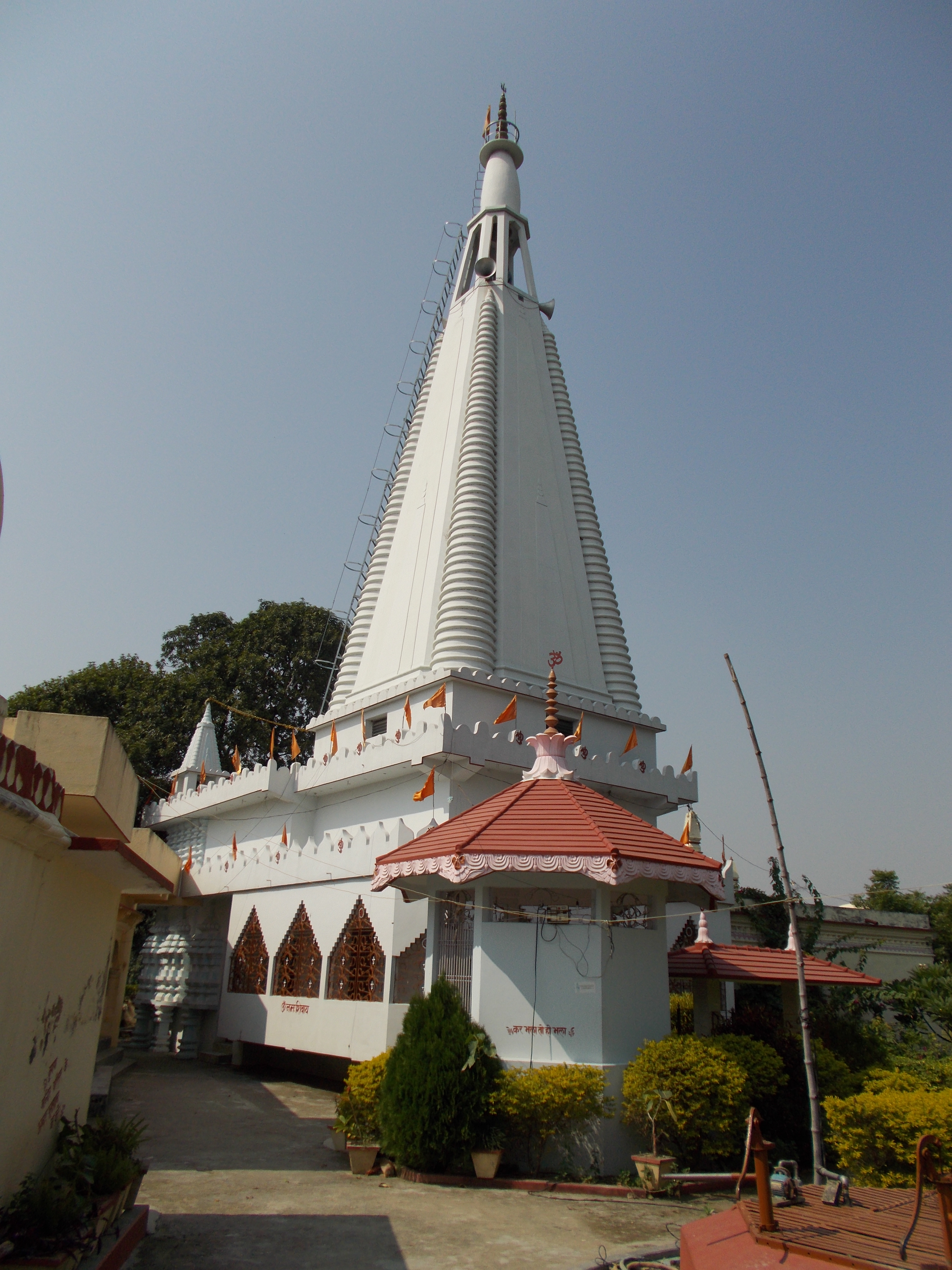 कामेश्वर धाम कारो बलिया उ0प्र0 भारत